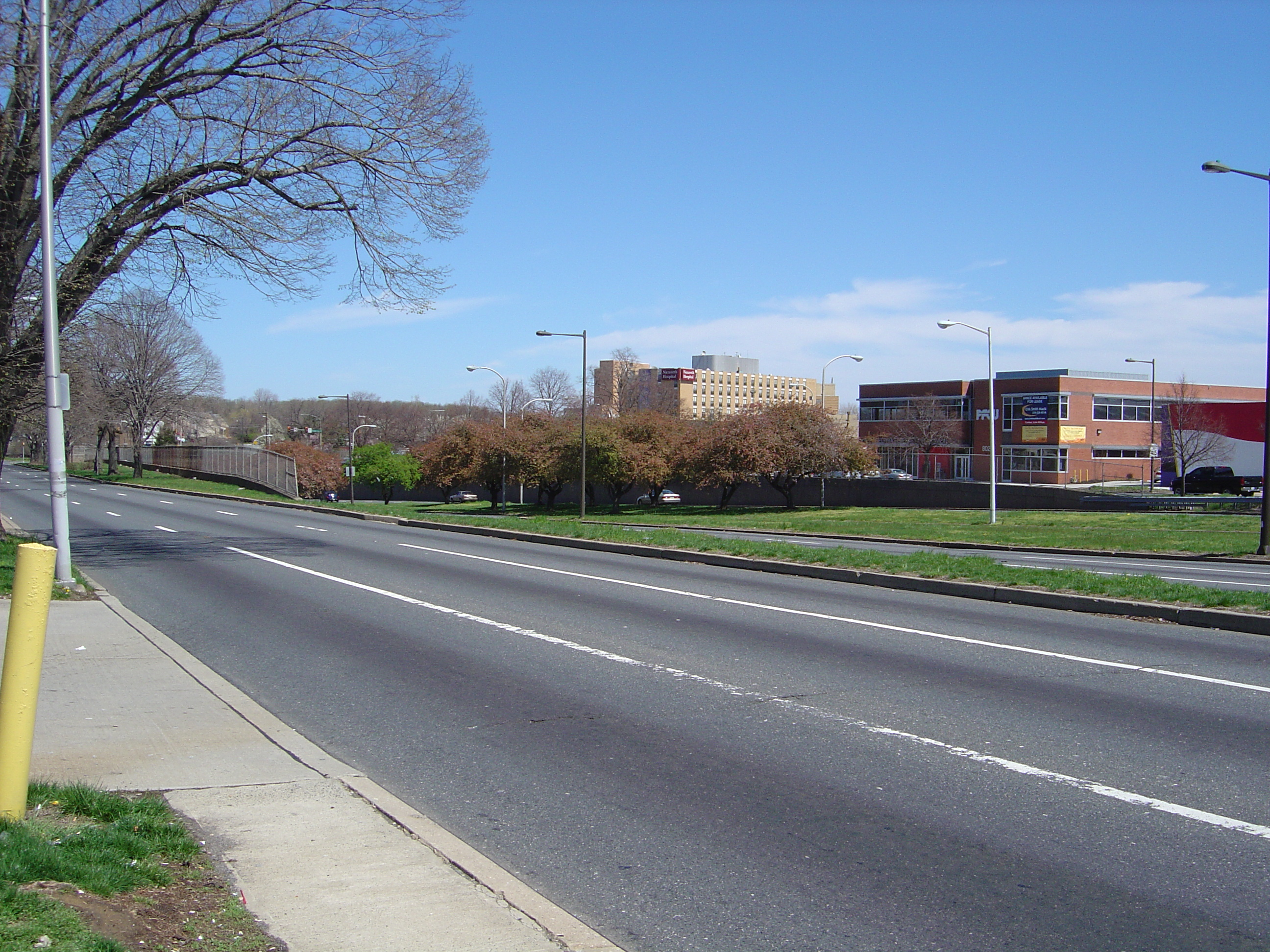 Roosevelt Boulevard (Philadelphia)